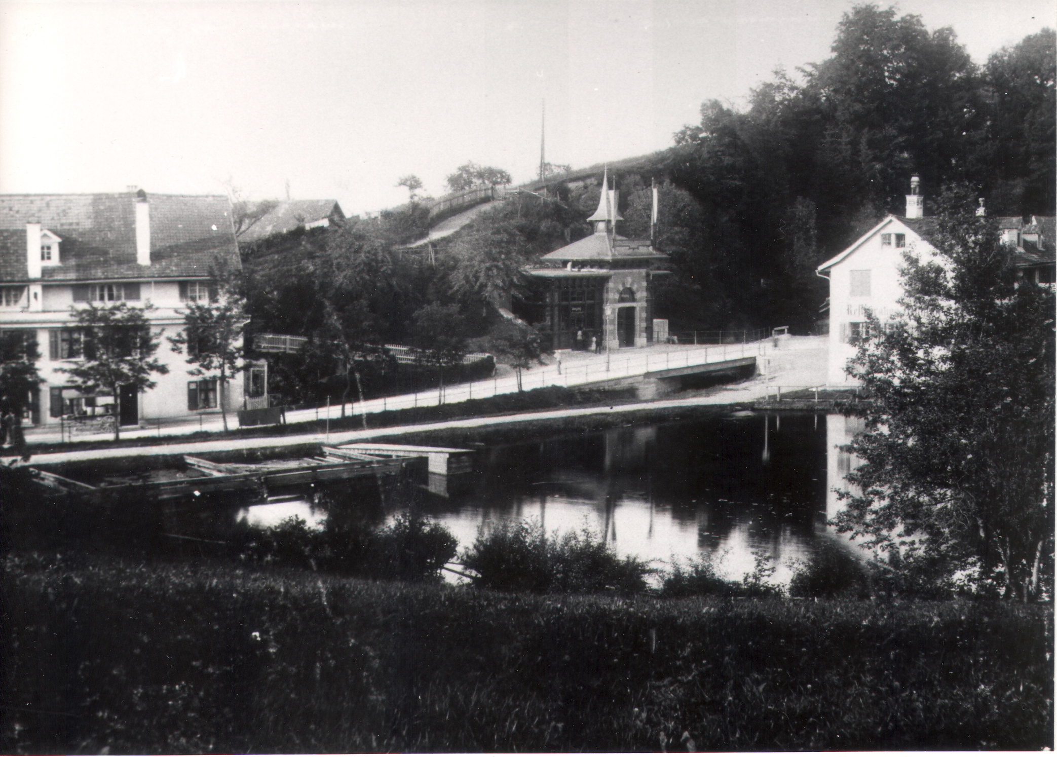 Blick gegen Osten; vorne der Mühleggweiher; dahinter die Bergstation der Mühleggbahn rechts vom Weiher das Restaurant Mühlegg, St. Gallen, Aufnahme 1895 - 1900